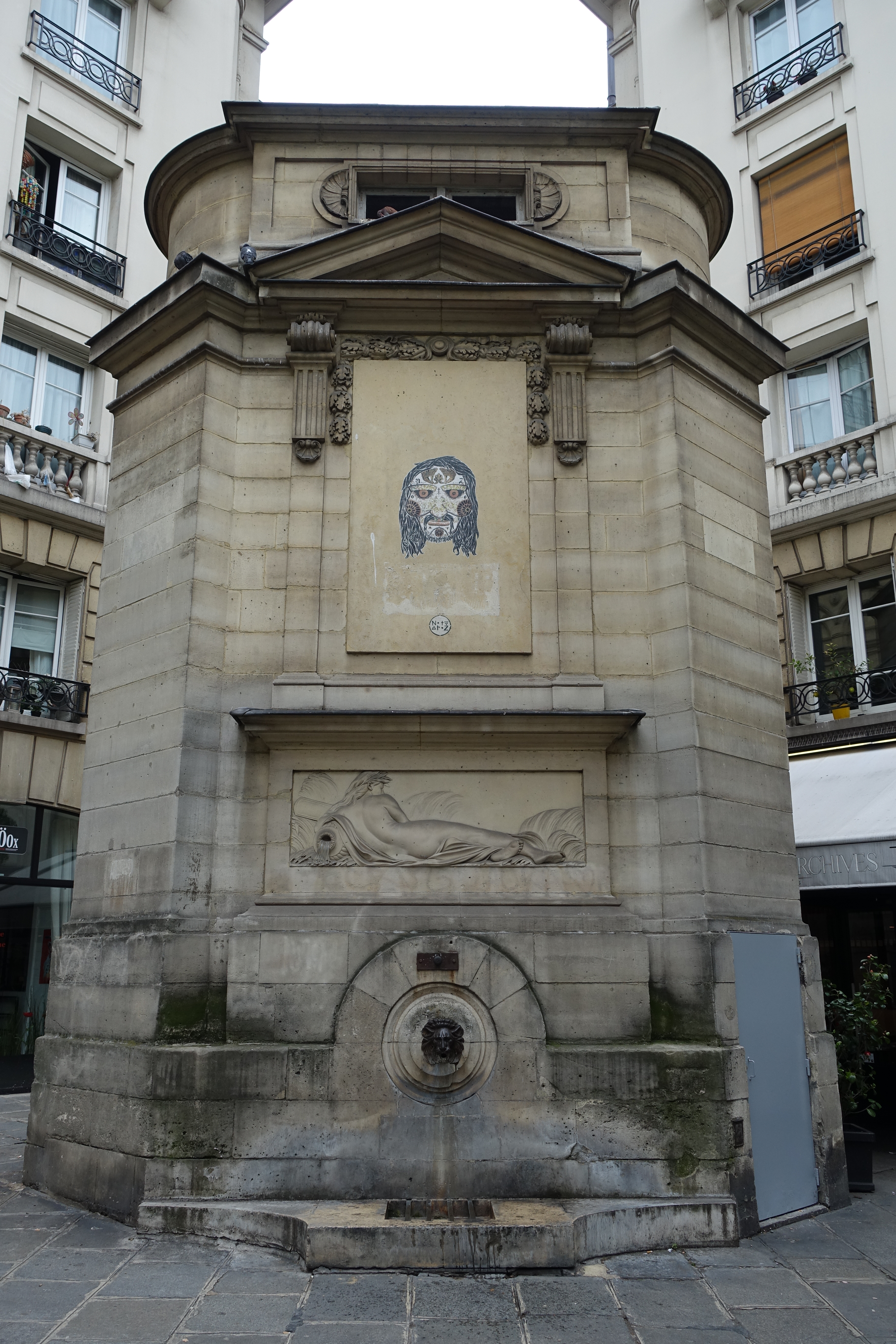 Fountain @ Le Marais @ Paris